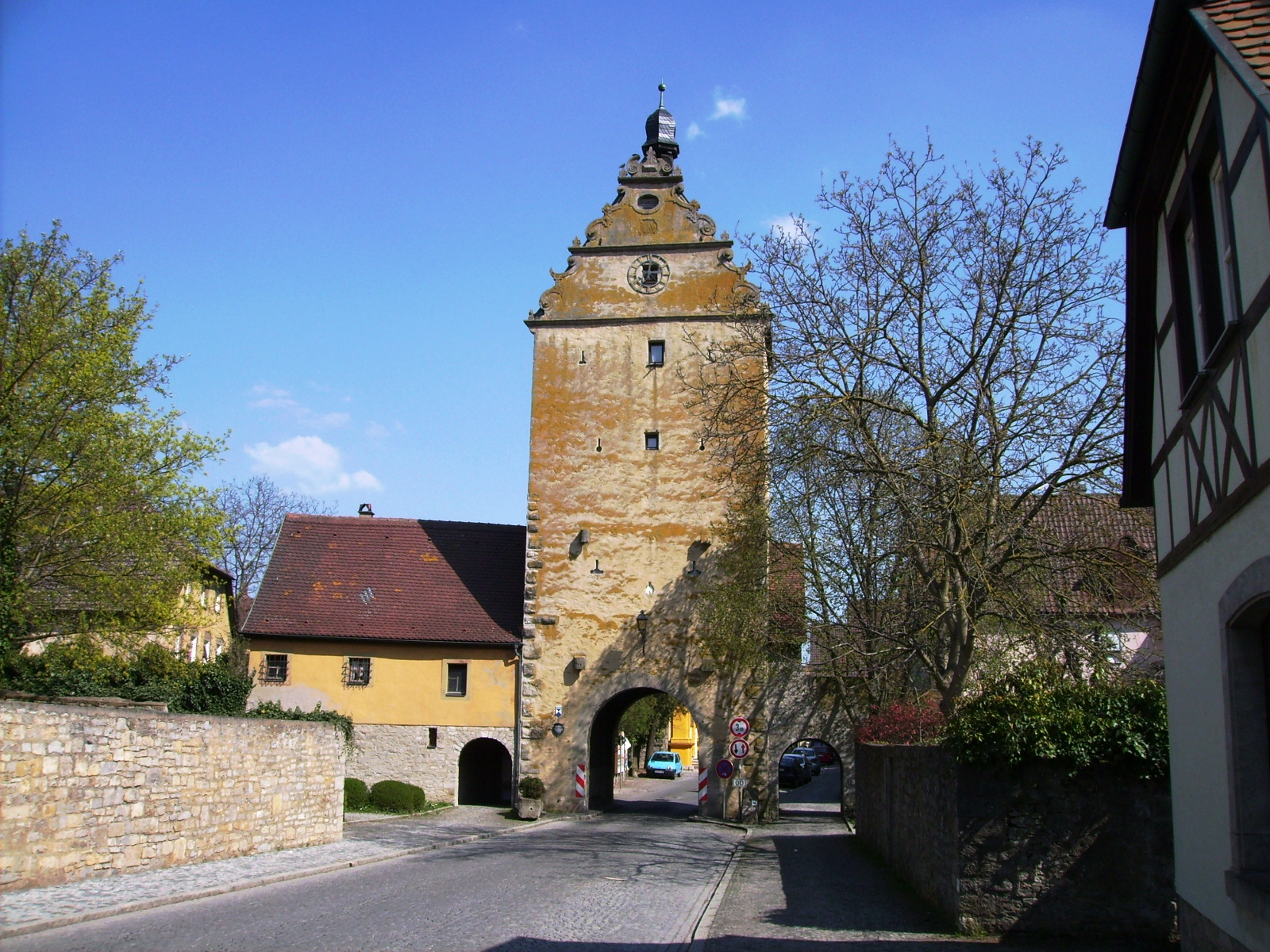 Frickenhausen am Main, Deutschland. Unteres Tor, westliches Haupttor der im 15. Jahrhundert erbauten Befestigung mit Renaissancegiebel von 1518.